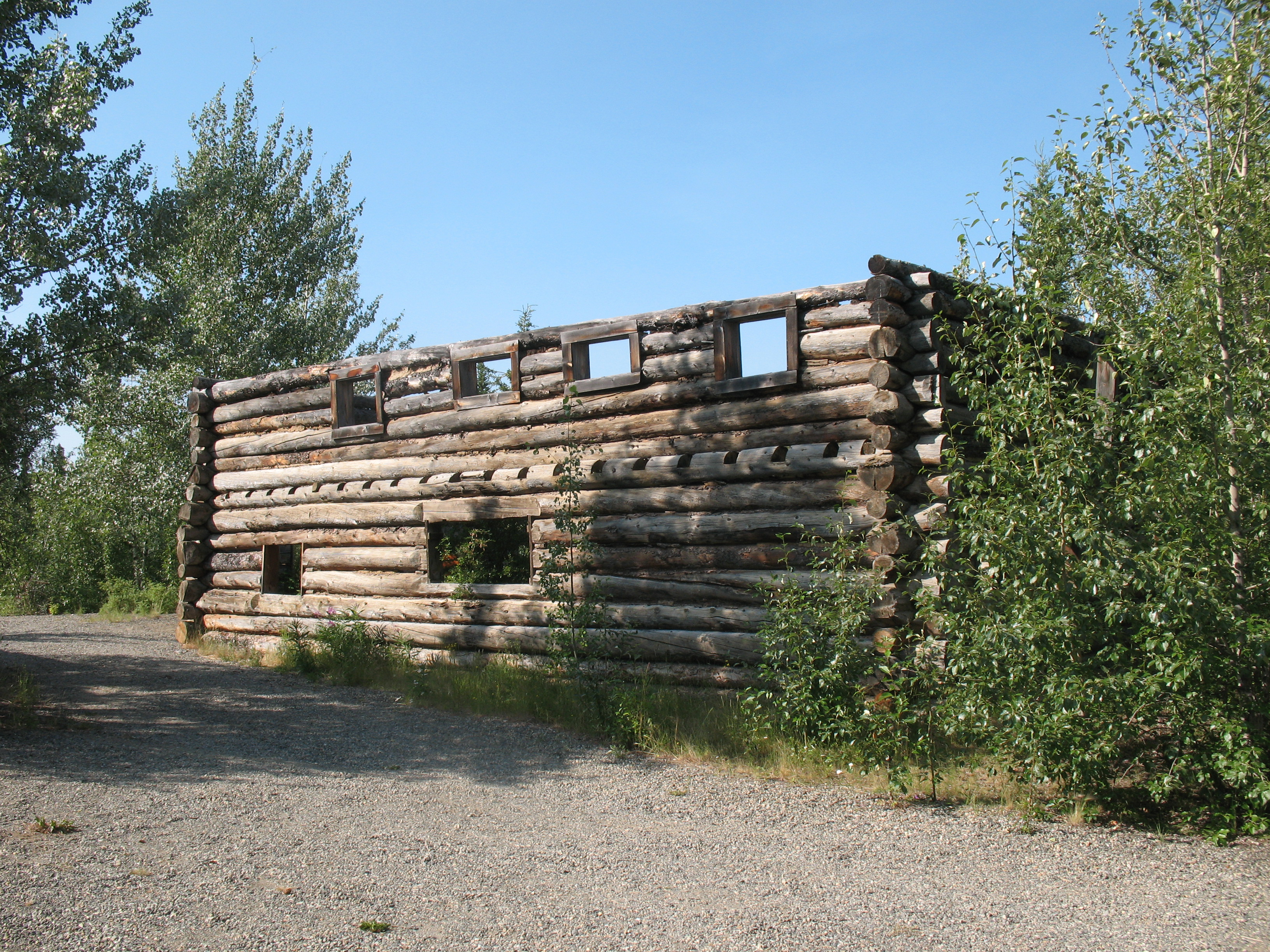 Rückseite des Montague-Roadhauses